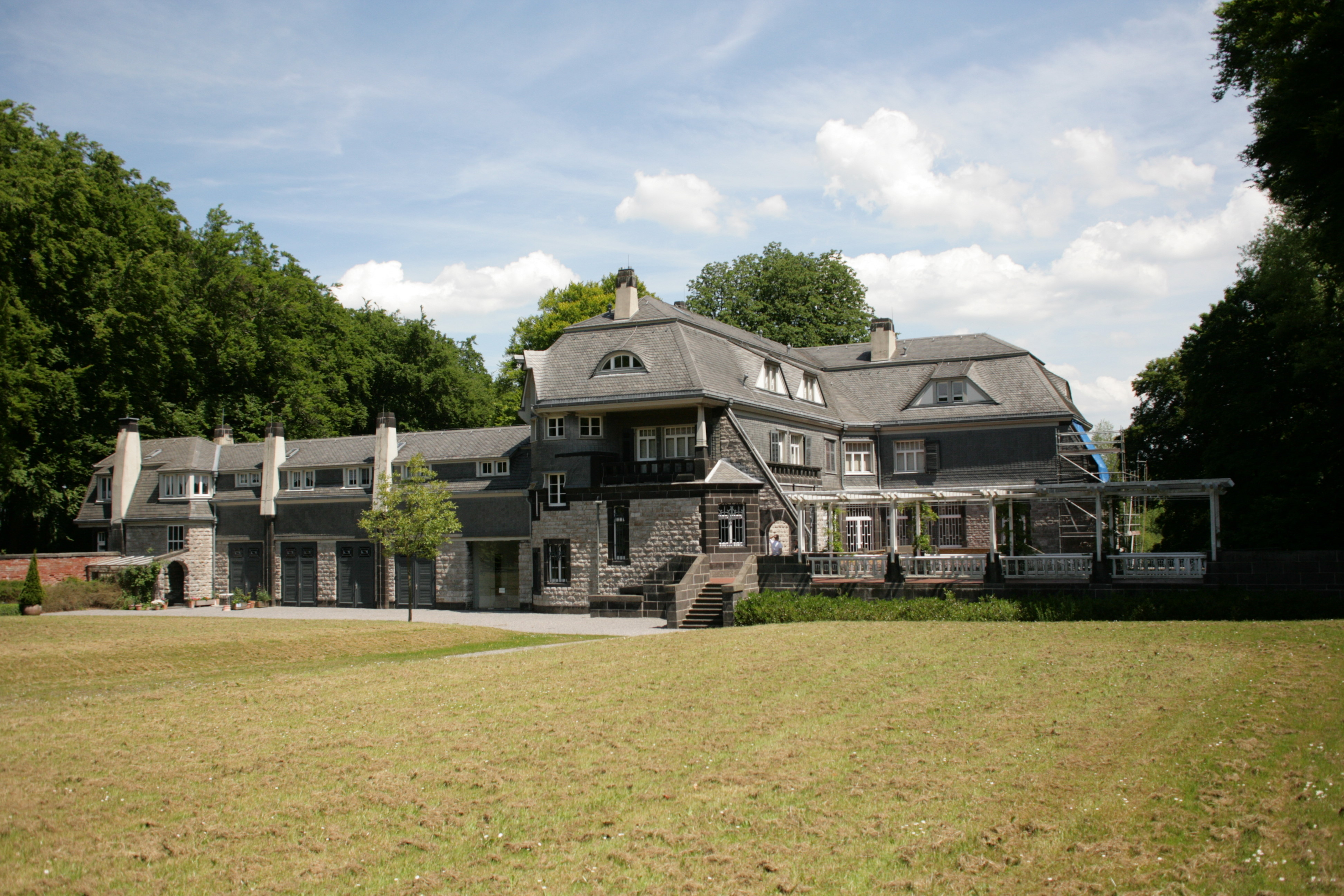 Hohenhof, Stirnband 10 in Hagen